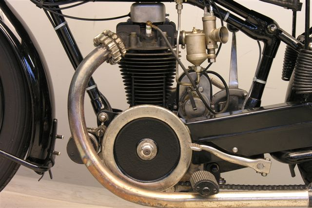 Chaise 350 cc OHV engine in a Soyer motorcycle from 1930. (see File:Soyer Model SC 350 cc Chaise engine 1930.jpg).